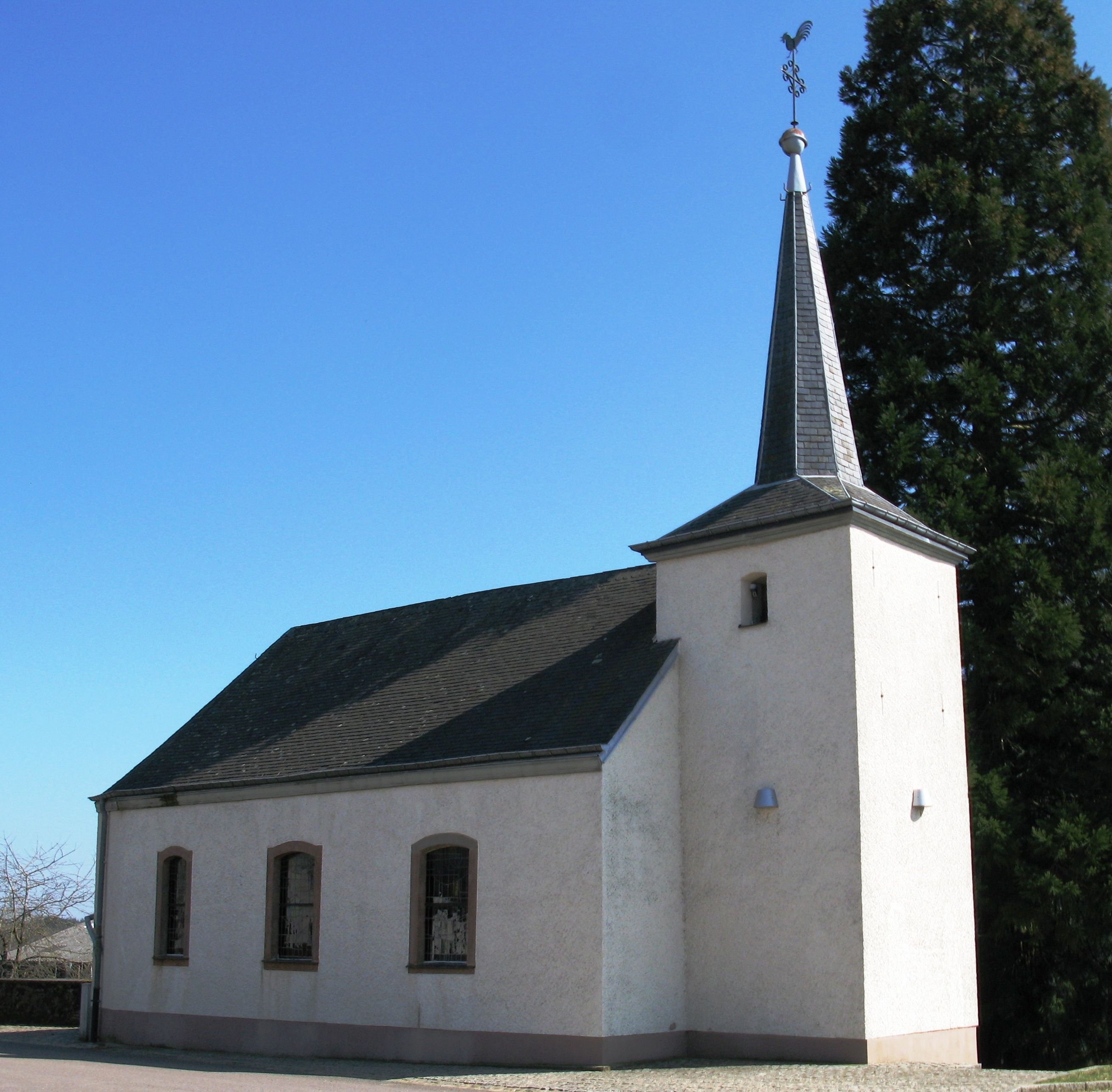 D'Kapell zu Eschent.